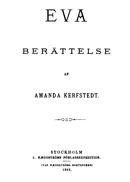 Eva (1888)